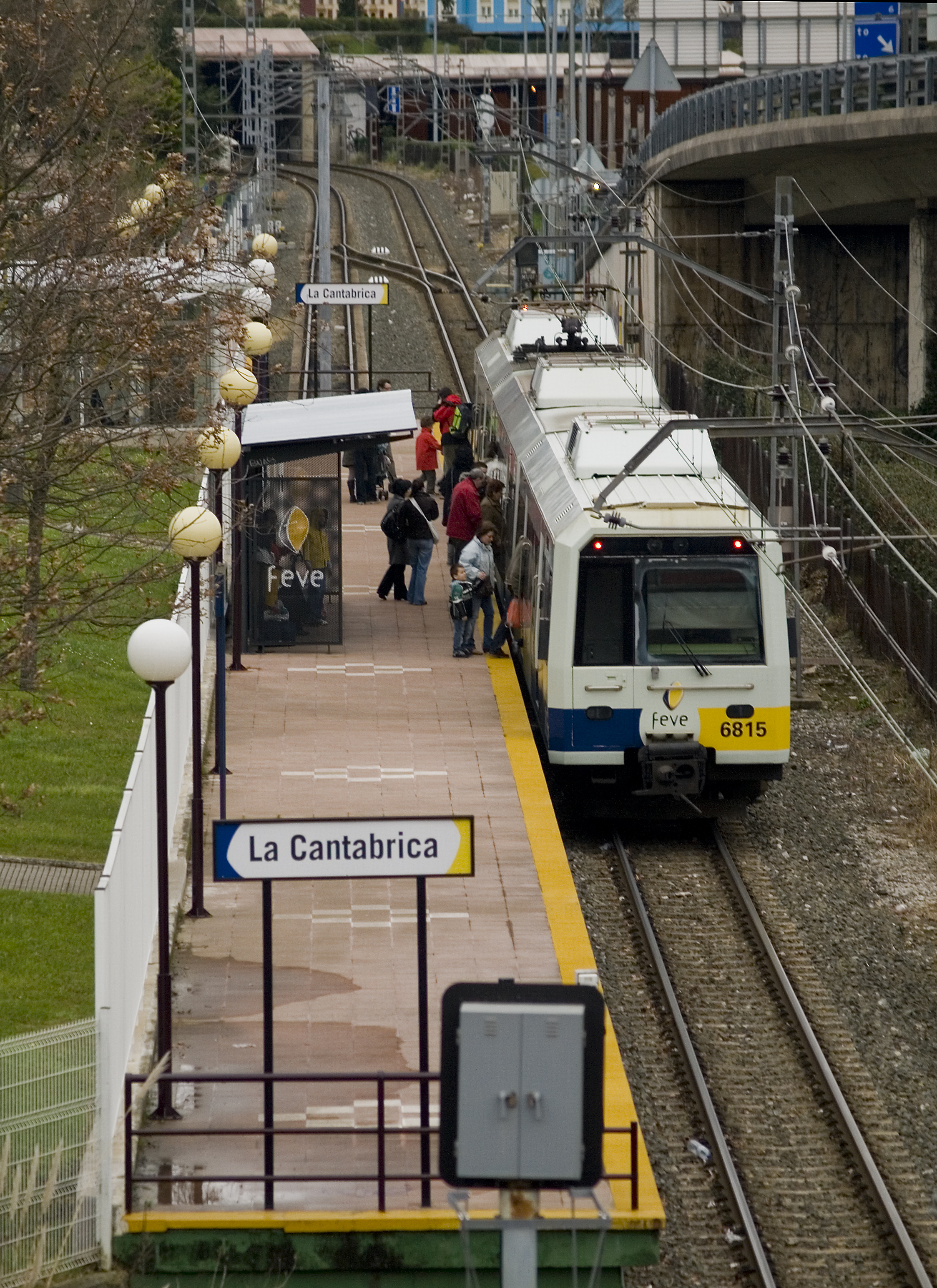 Apeadero de FEVE "La Cantábrica", El Astillero (Cantabria)